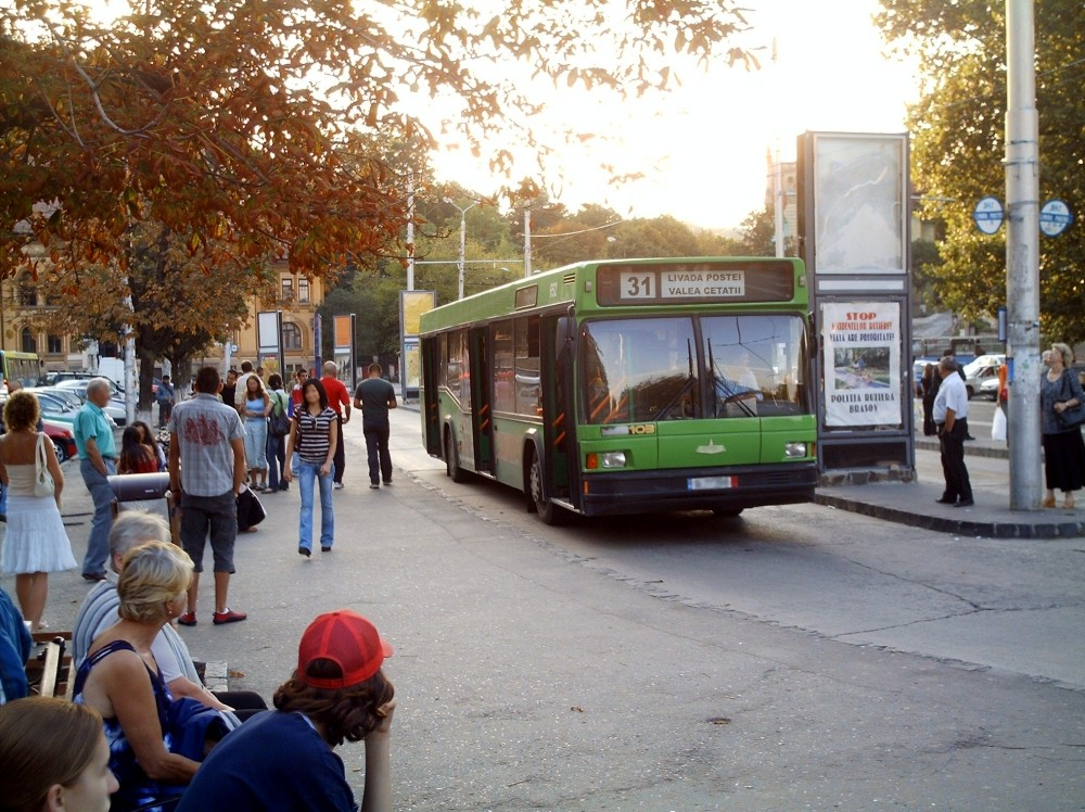 Autobuzele din Brasov